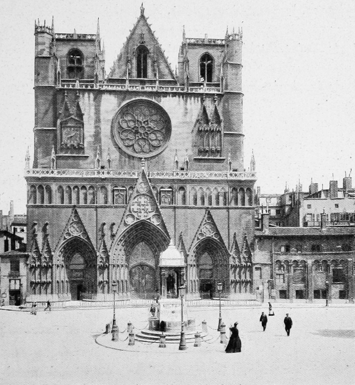 Dictionnaire illustré des communes du département du Rhône. Tome 2 / par MM. E. de Rolland et D. Clouzet.